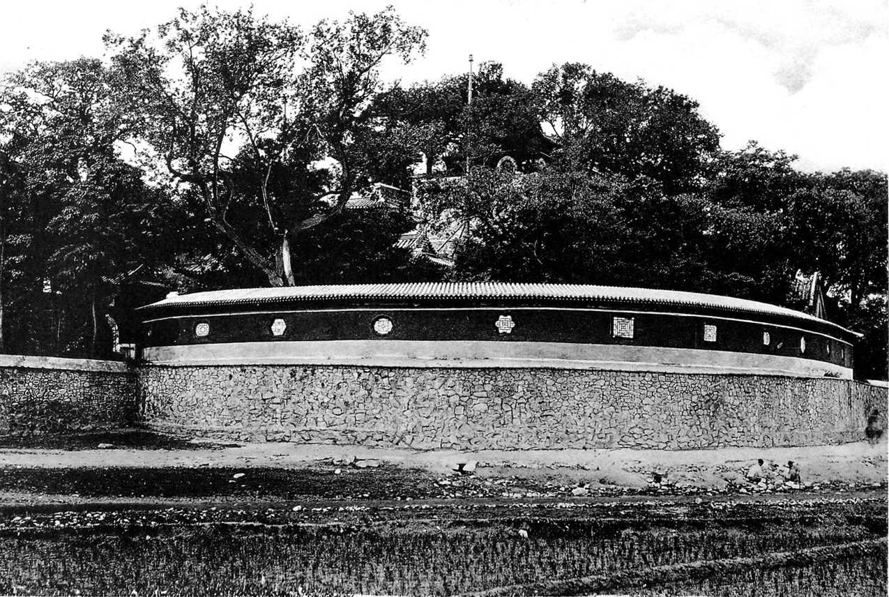 photo from Ein Tagebuch in Bildern